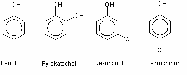 Fenoly